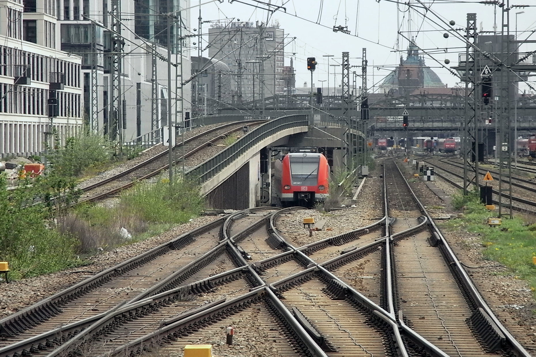 München, Überwerfung zwischen S-Bahn-Stammstrecke und Abzweig zum Starnberger Flügelbahnhof.